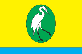 Прапор Чаплинського району